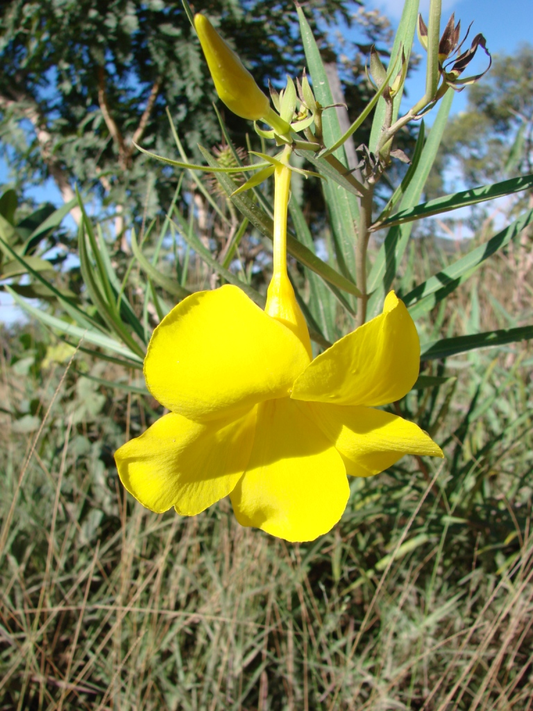 Allamanda angustifolia - APOCYNACEAE Parque Nacional Chapada dos Veadeiros - Cavalcante - Goiás - Brasil